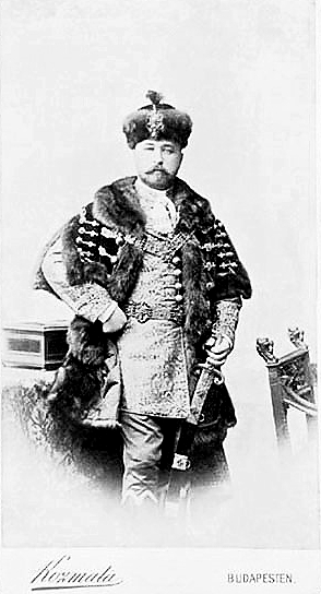 Törley József portréja. Kozmata Ferenc fényképészműhelyében készült felvétel (1800-as évek vége)